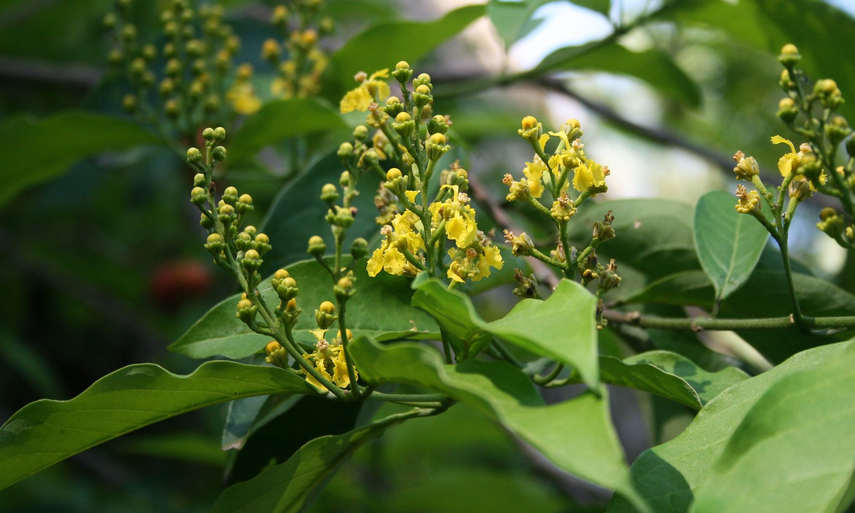 Bunchosia nitida, Malpighiaceae - Costa Rica: Prov. Puntarenas, Hacienda Barú NW Dominical